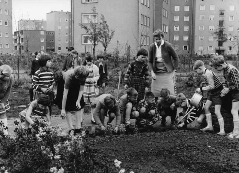 Goethe-Schule (Volksschule) in Salzgitter-Lebenstedt.